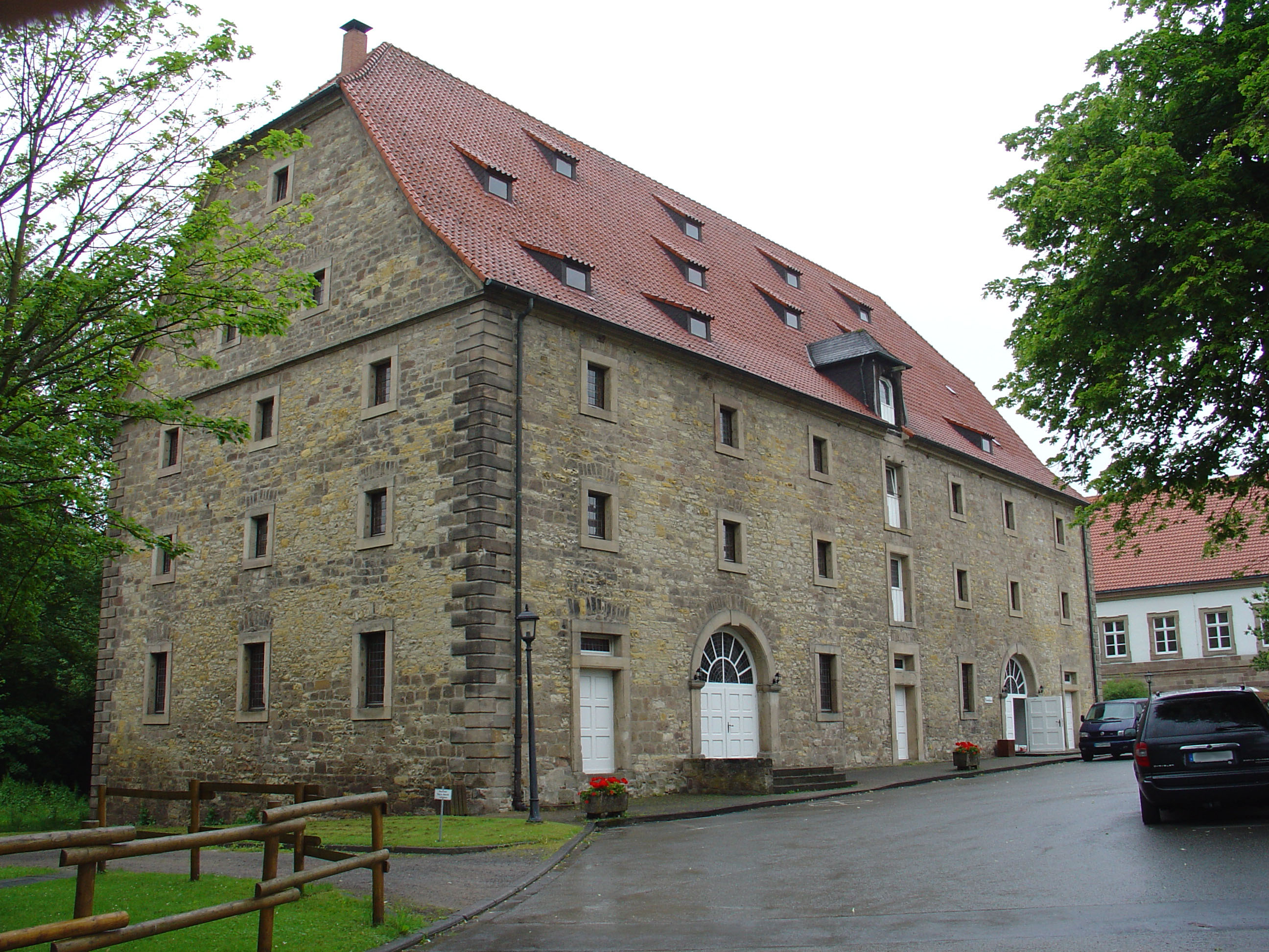 Kornhaus des Klosters Hardehausen